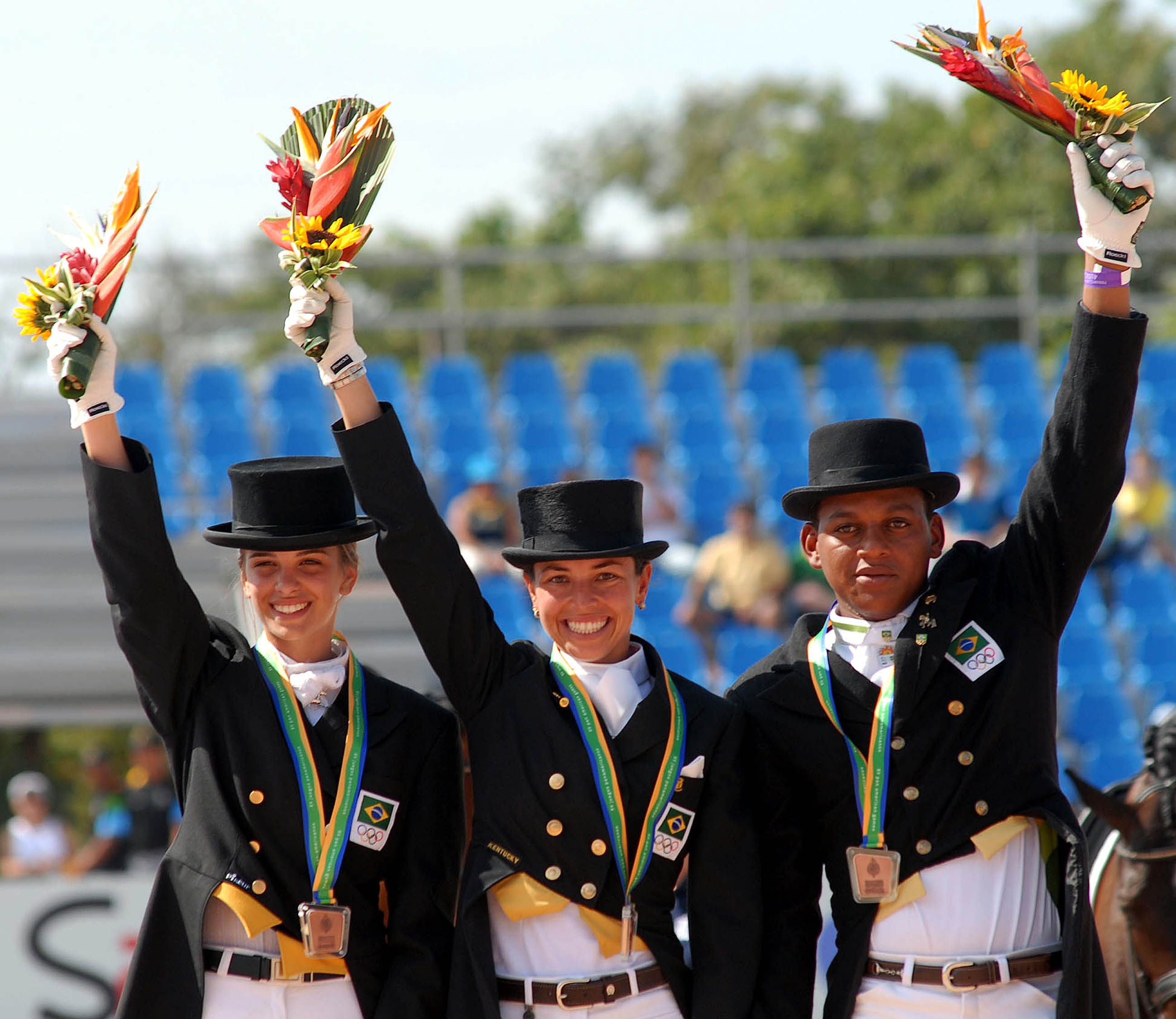 Rio de Janeiro - Equipe da modalidade adestramento, que ganhou a medalha de bronze nos Jogos Pan-Americanos. Os atletas são Luíza Almeida, Renata Costa e Rogério Clementino.